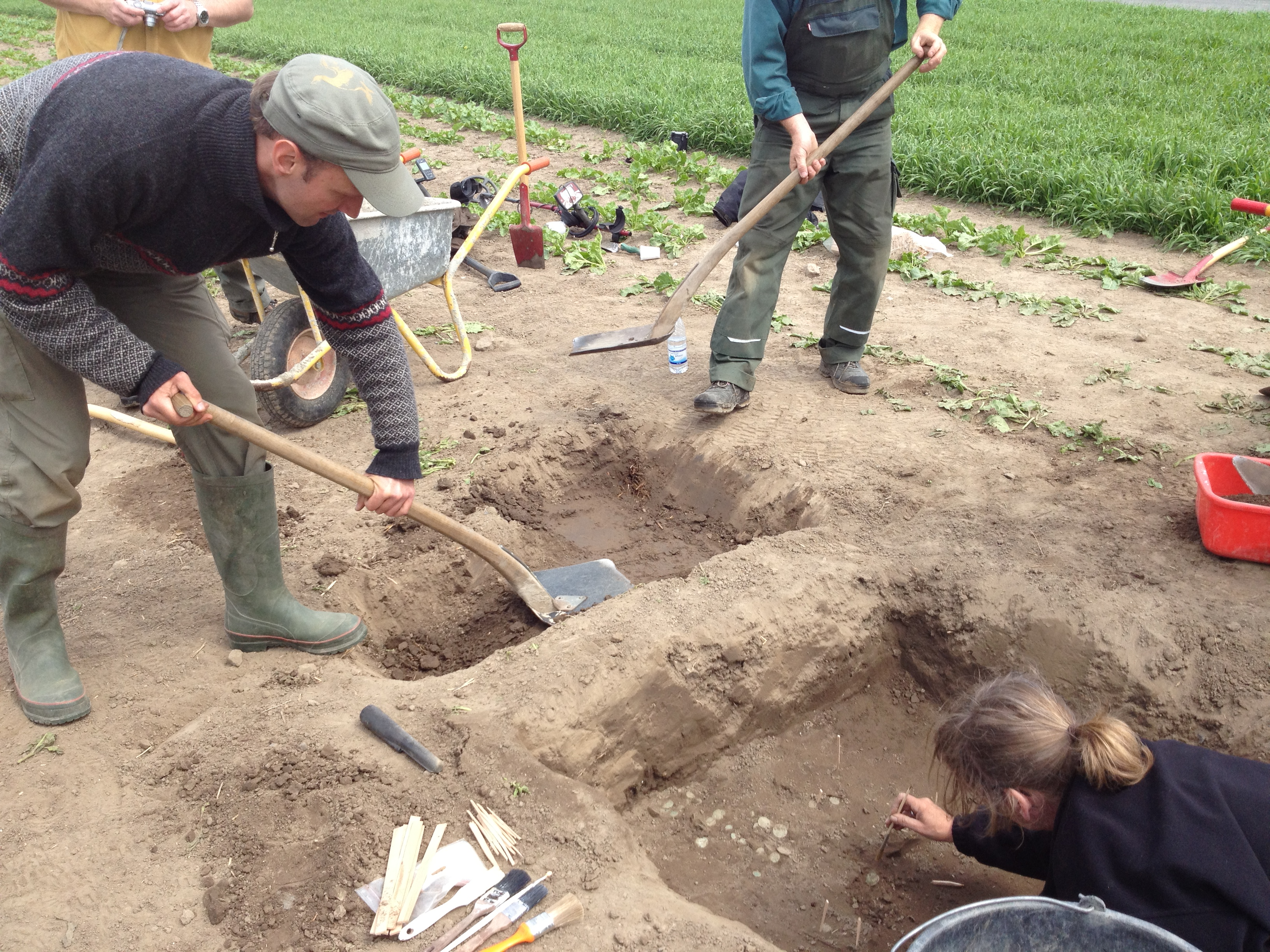 Møntskatten fra Møn udgraves